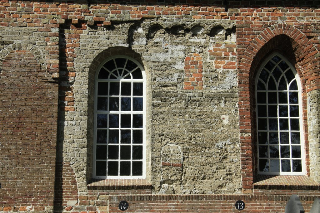 De tand des tijds aan de kerk van Wetsen in Friesland. De witte tufsteen is de oorspronkelijke steen soort van deze Romaanse kerk uit de 12e eeuw!